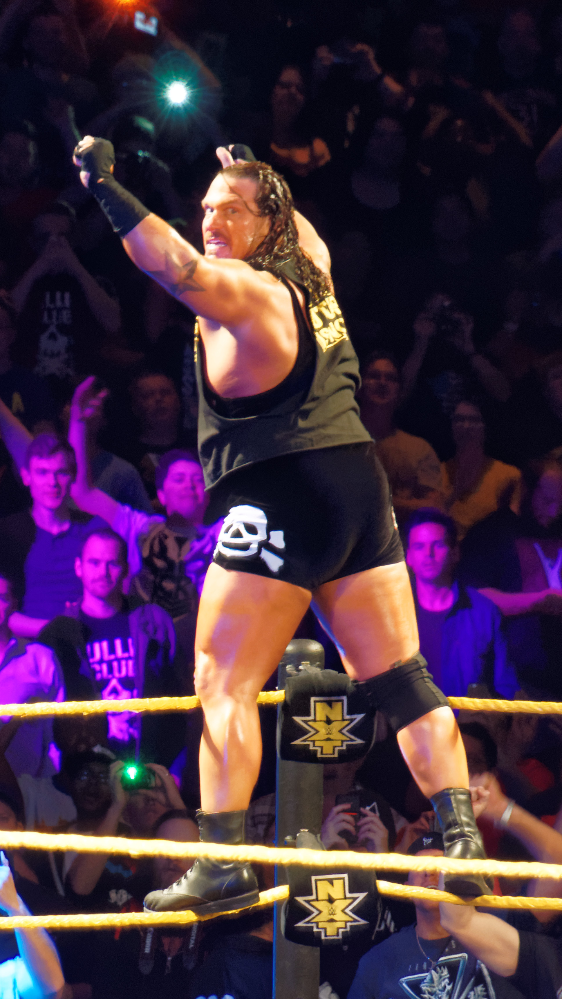 2015-03-27_23-14-04_ILCE-6000_3550_DxO